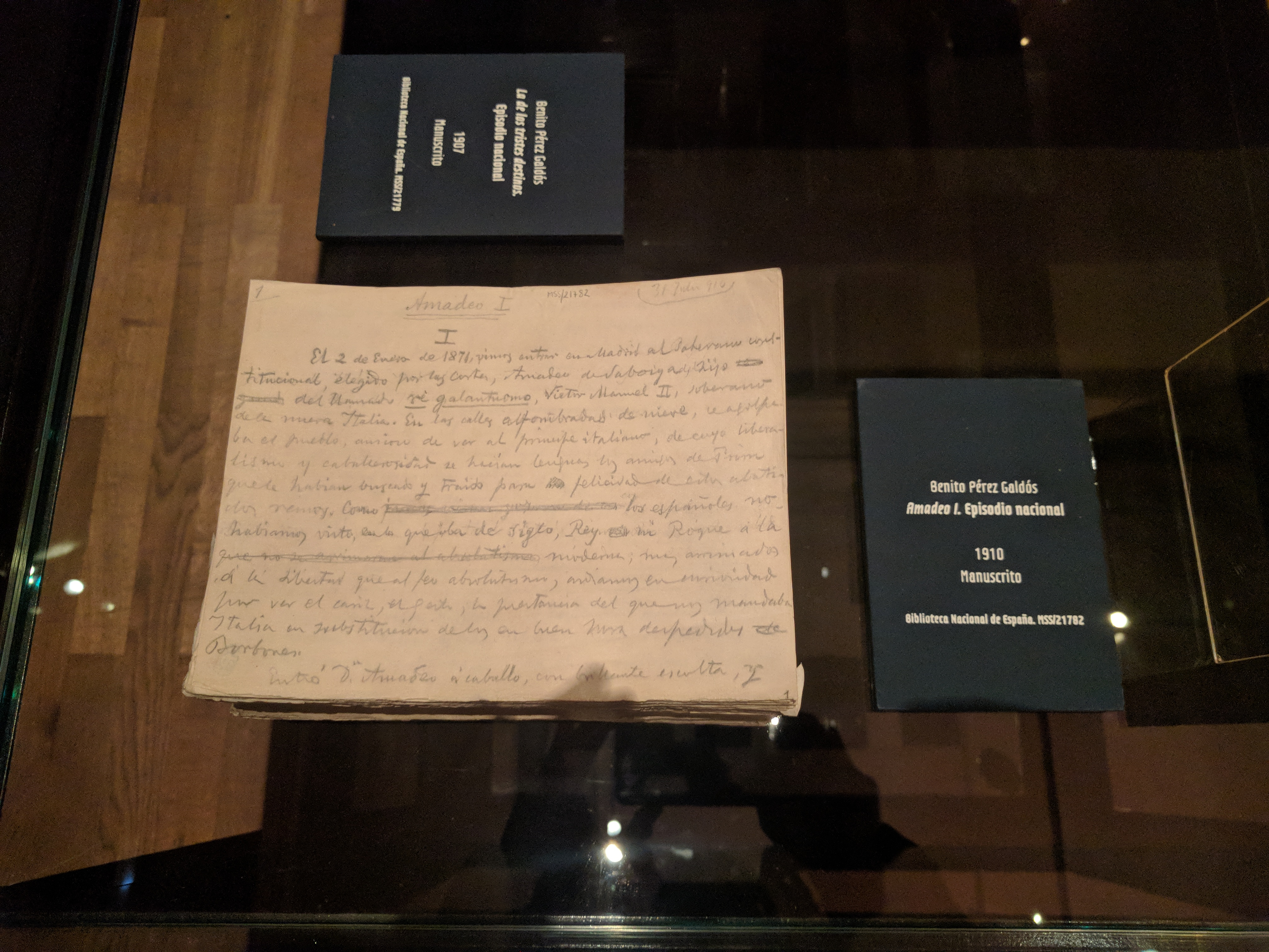 Manuscrito de Amadeo I (episodio nacional) de Benito Pérez Galdós, 1910. Biblioteca Nacional de España.